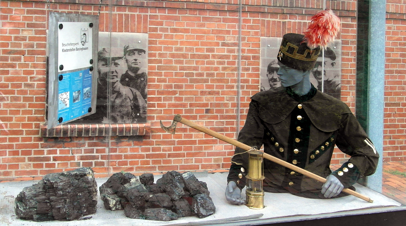 Vitrine mit Ausstellungsobjekten im Besucherbergwerk Klosterstollen Barsinghausen